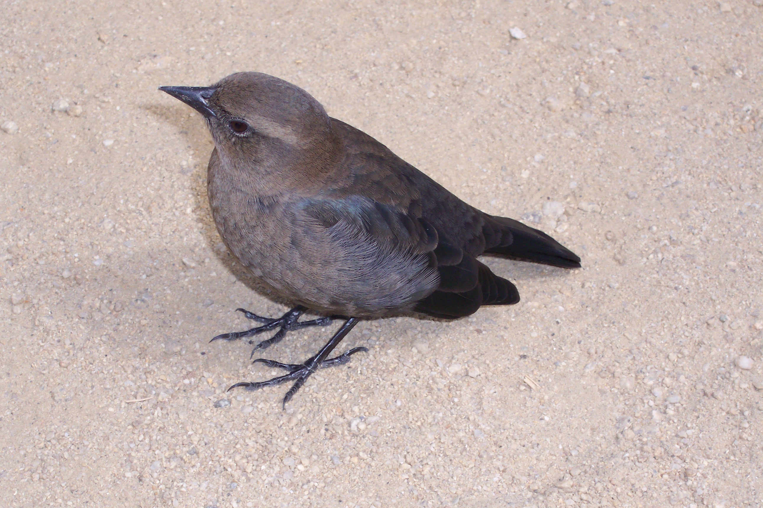 Purpurstärling am 17-Mile Drive in Kalifornien